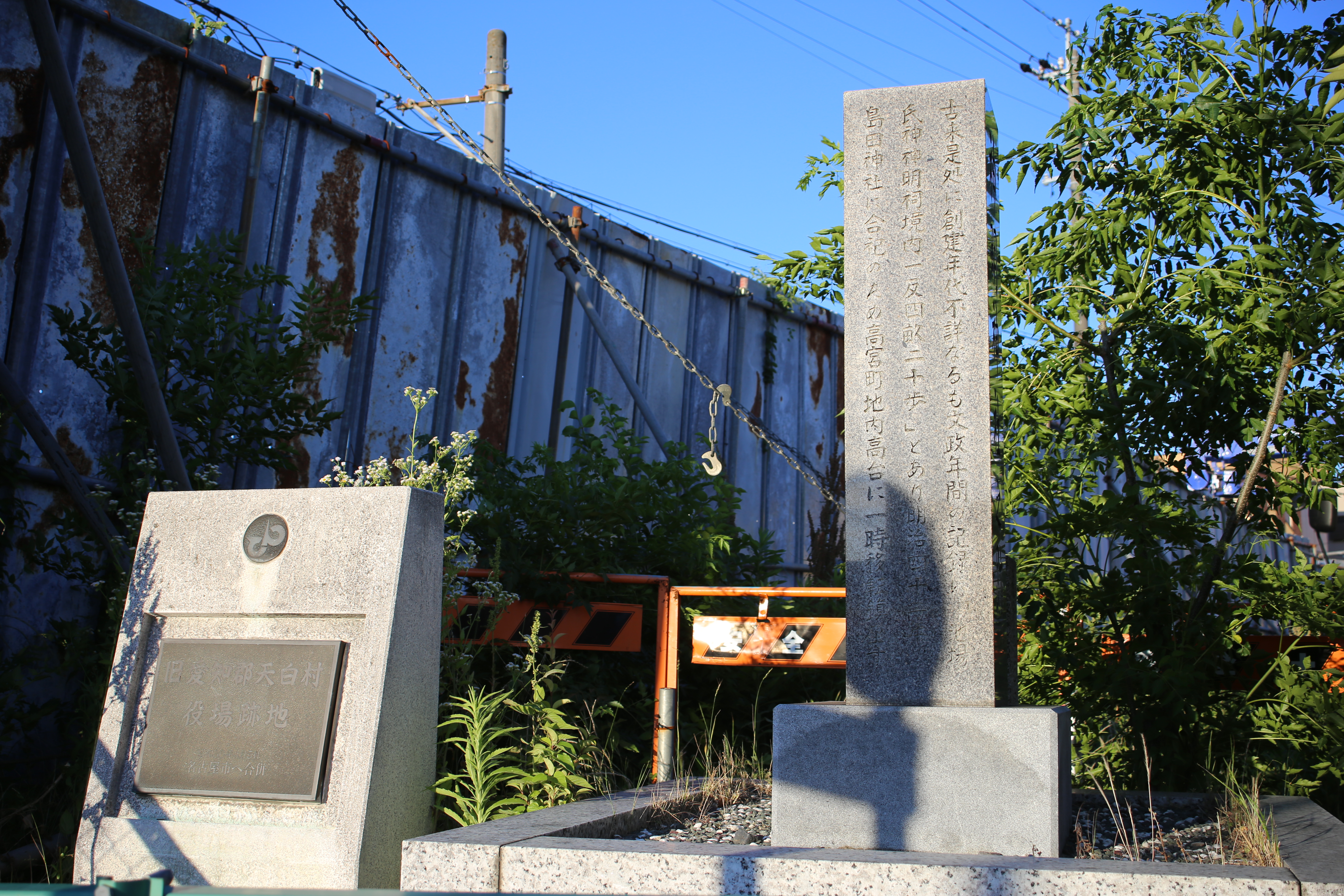 名古屋市天白区池場二丁目の愛知県愛知郡天白村役場跡地碑を西側公道南側より撮影